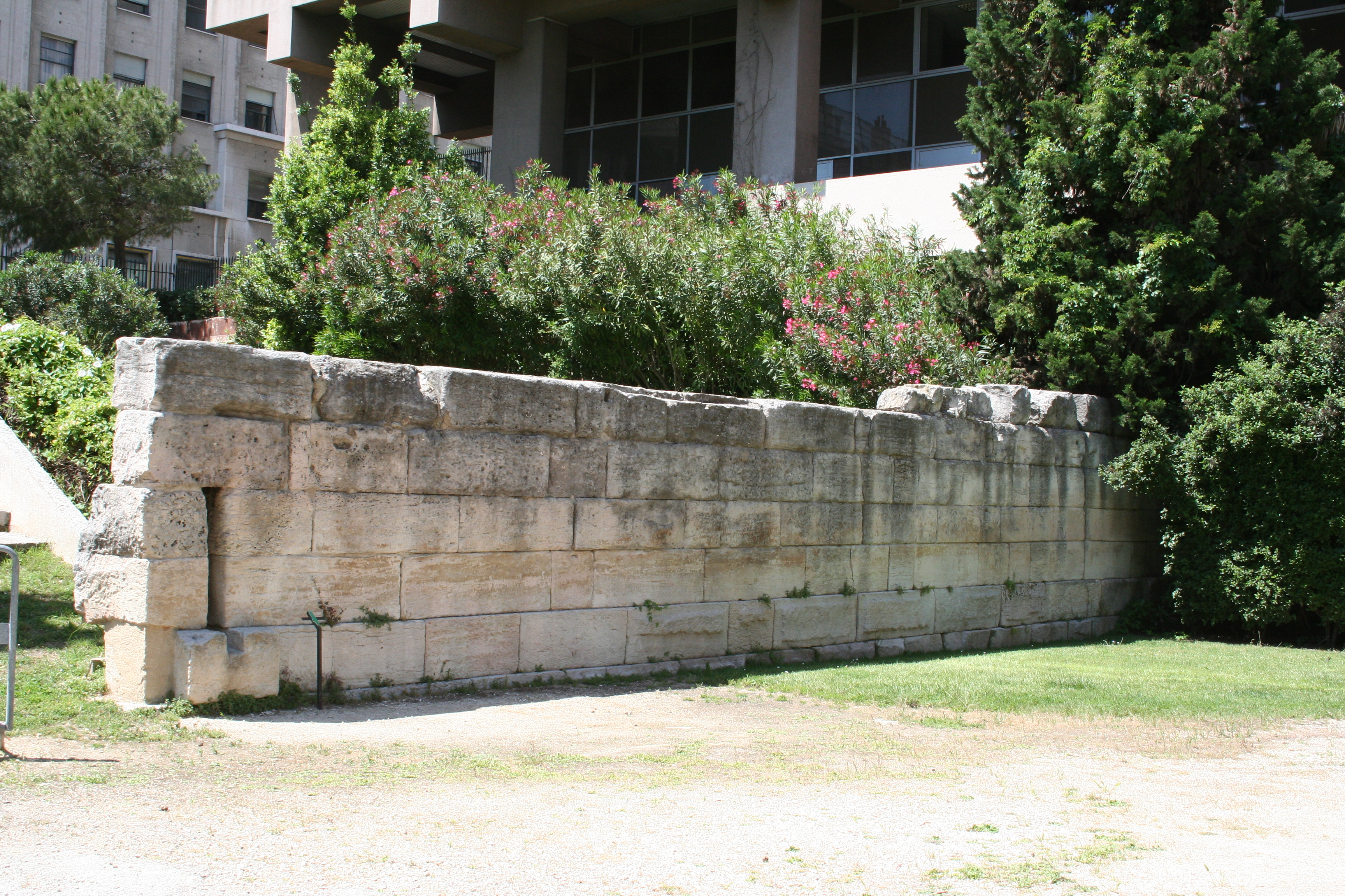 Mur de Crinas au jardin des vestiges à Marseille avec en bas à gauche du mur une chantepleure. Rempart grec du IIe siècle avant Jésus Christ.